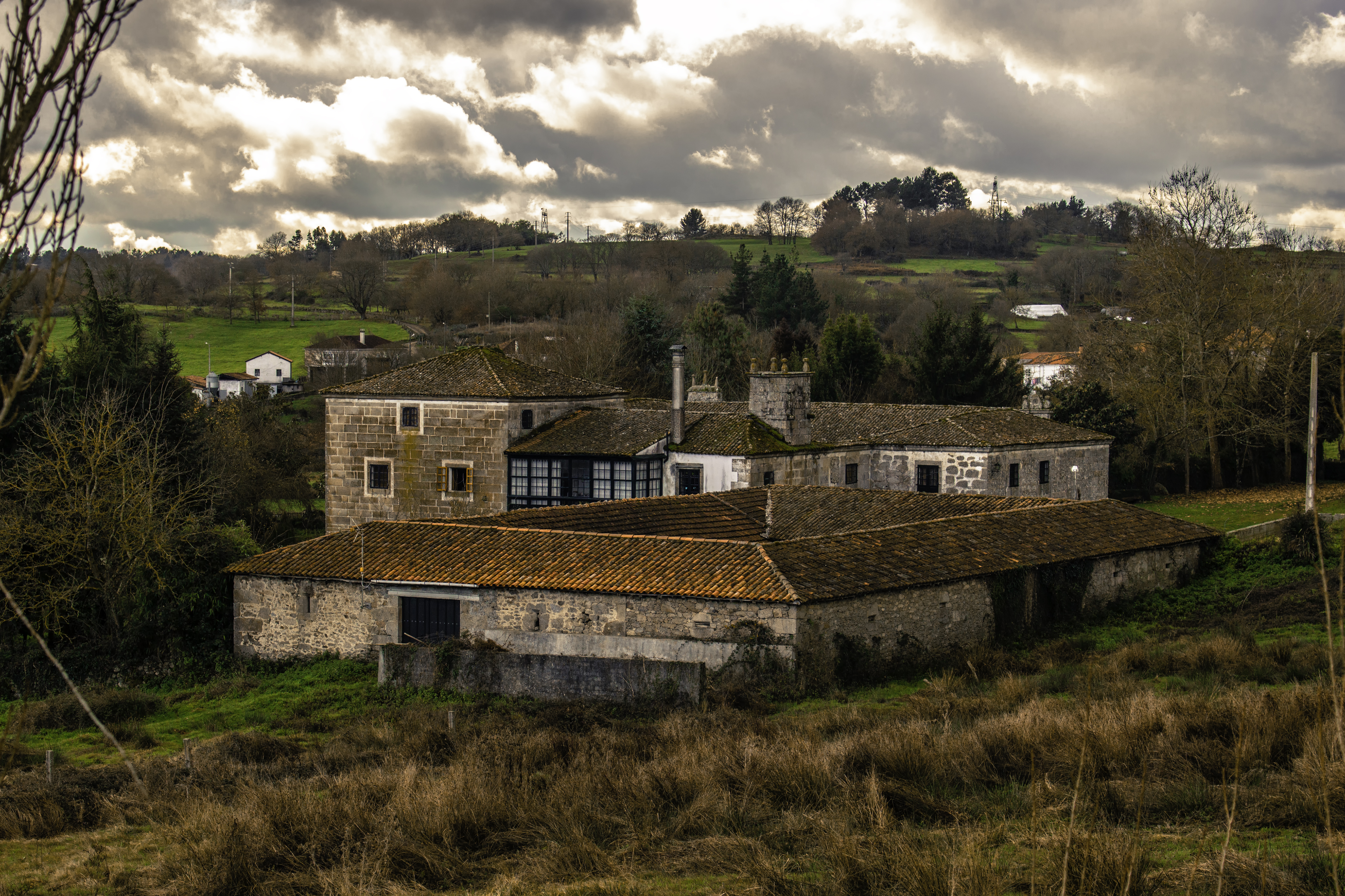 Casa de Carral Travesa, Chantada.